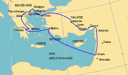 Voyage de Paul (second). Image créée avec Gimp à partir d'un fond de carte fourni par l'espace cartographie du site sciences-po. Domaine Public.